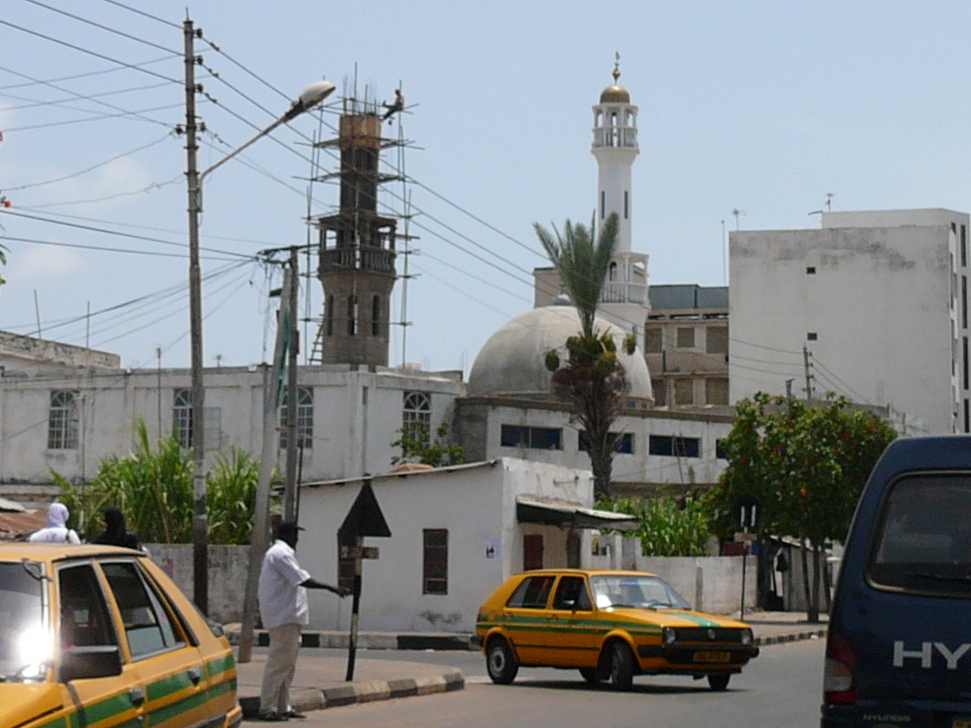 Straße in Banjul